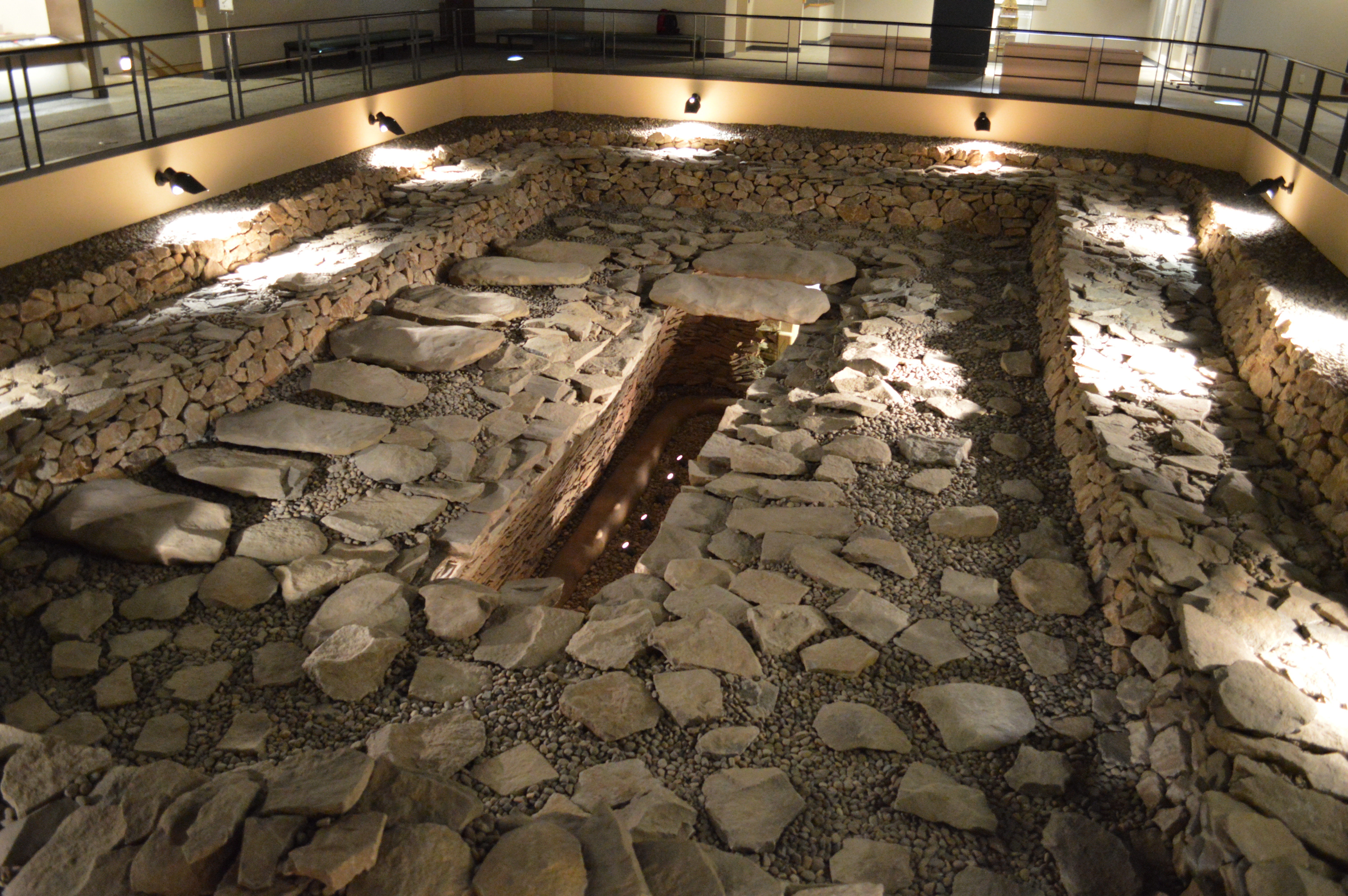 森将軍塚古墳 竪穴式石室 (古墳館内展示の復元)